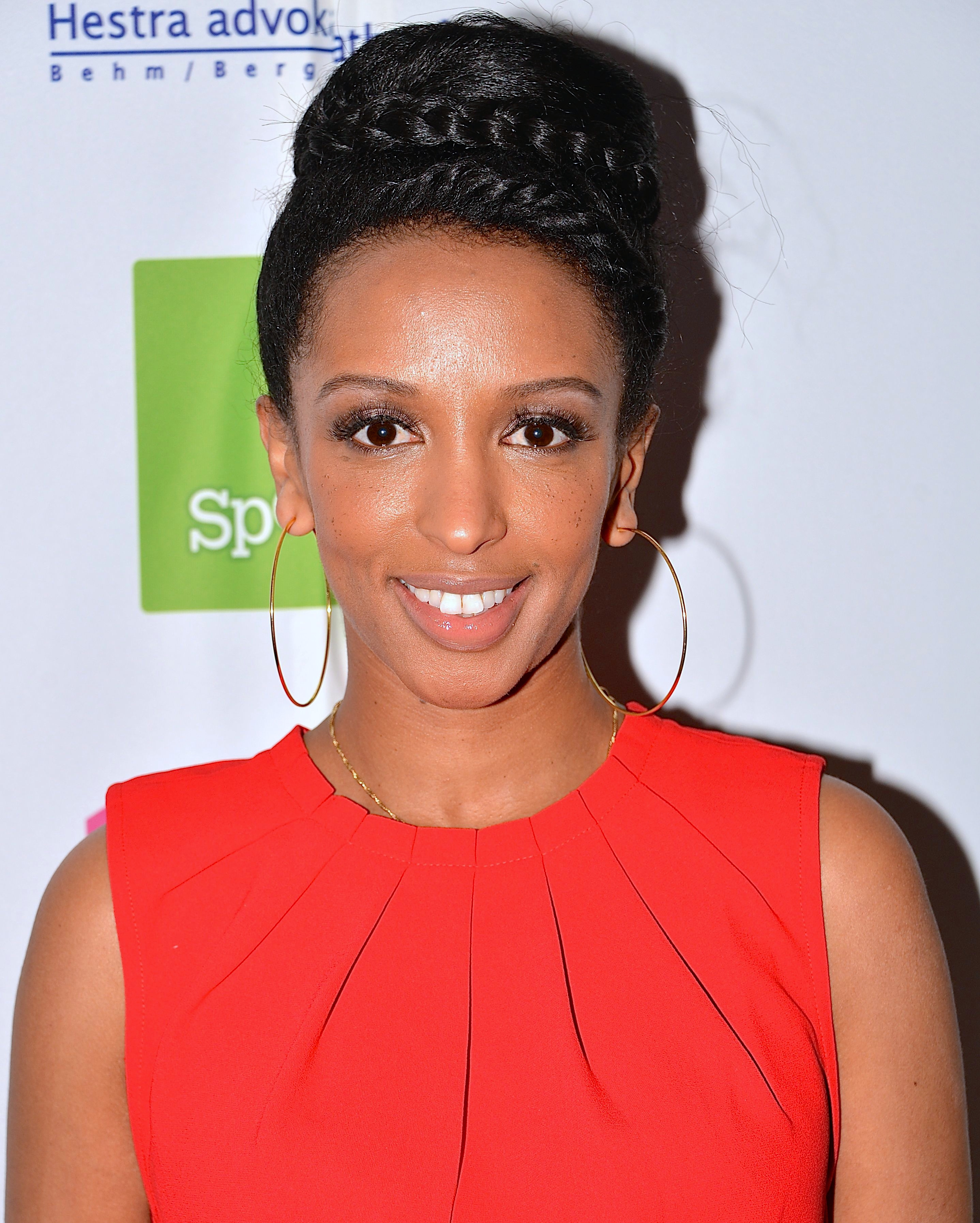 Feven på Grammisgalan på Cirkus, Stockholm den 20 februari 2013.